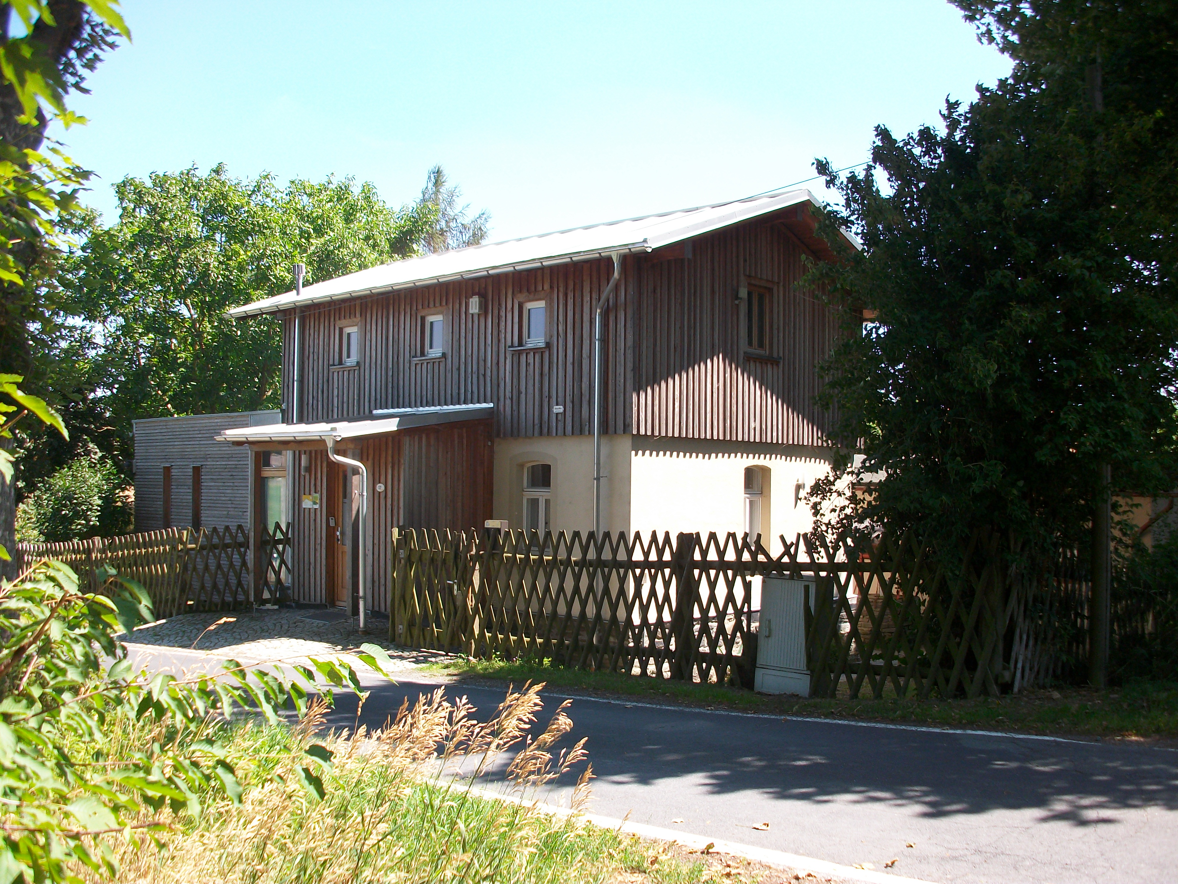 Bahnwärterhaus bei Droßdorf (2018)